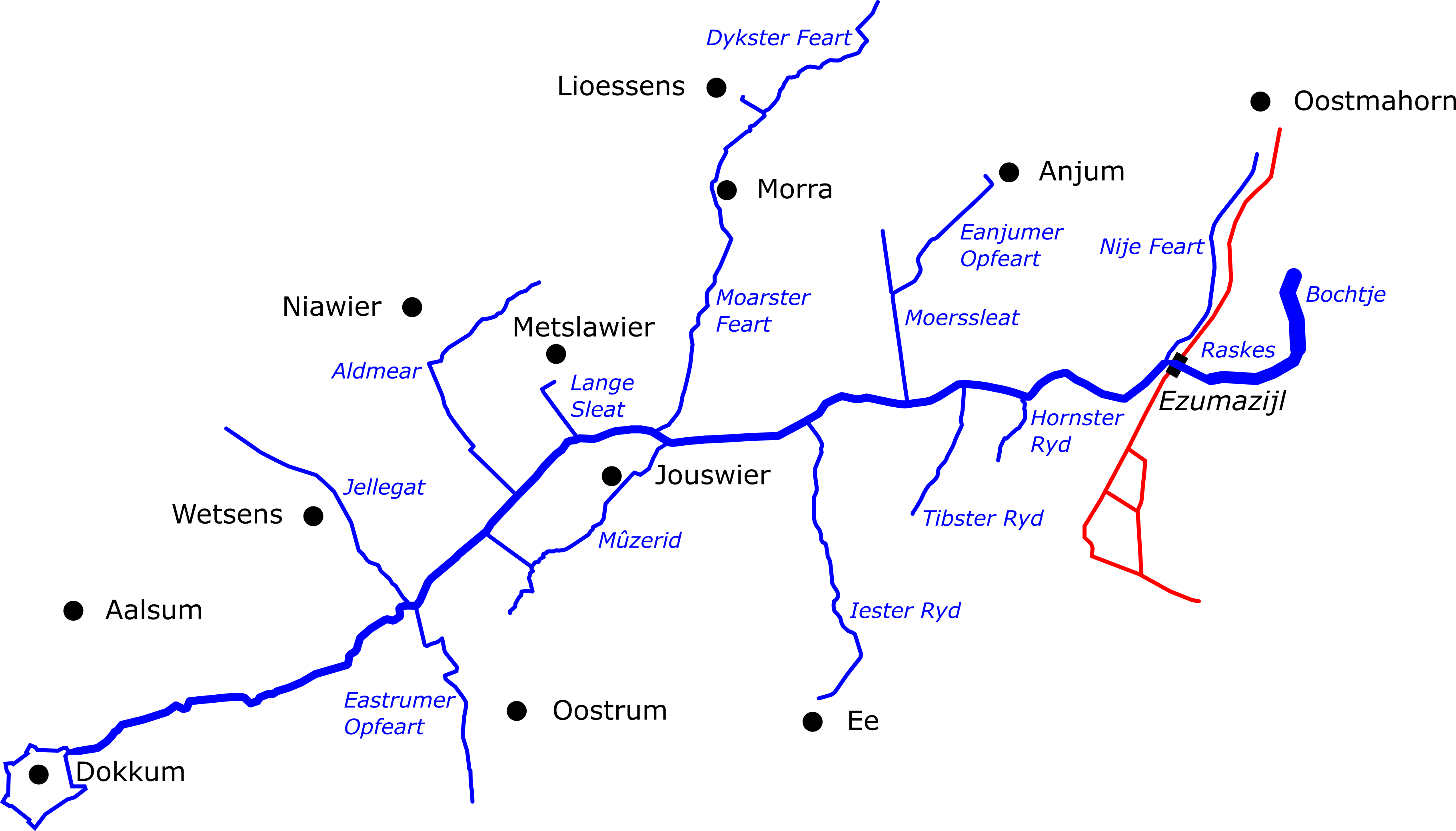 Loop van de Suderie (Zuider Ee), Friesland, Nederland. De Friese waternamen zijn de officiële.